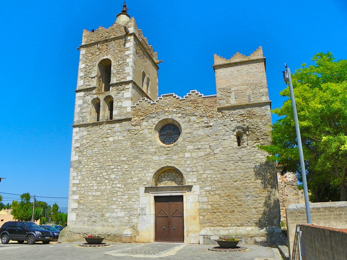 Església de Sant Julià i Santa Basilissa de Fortià